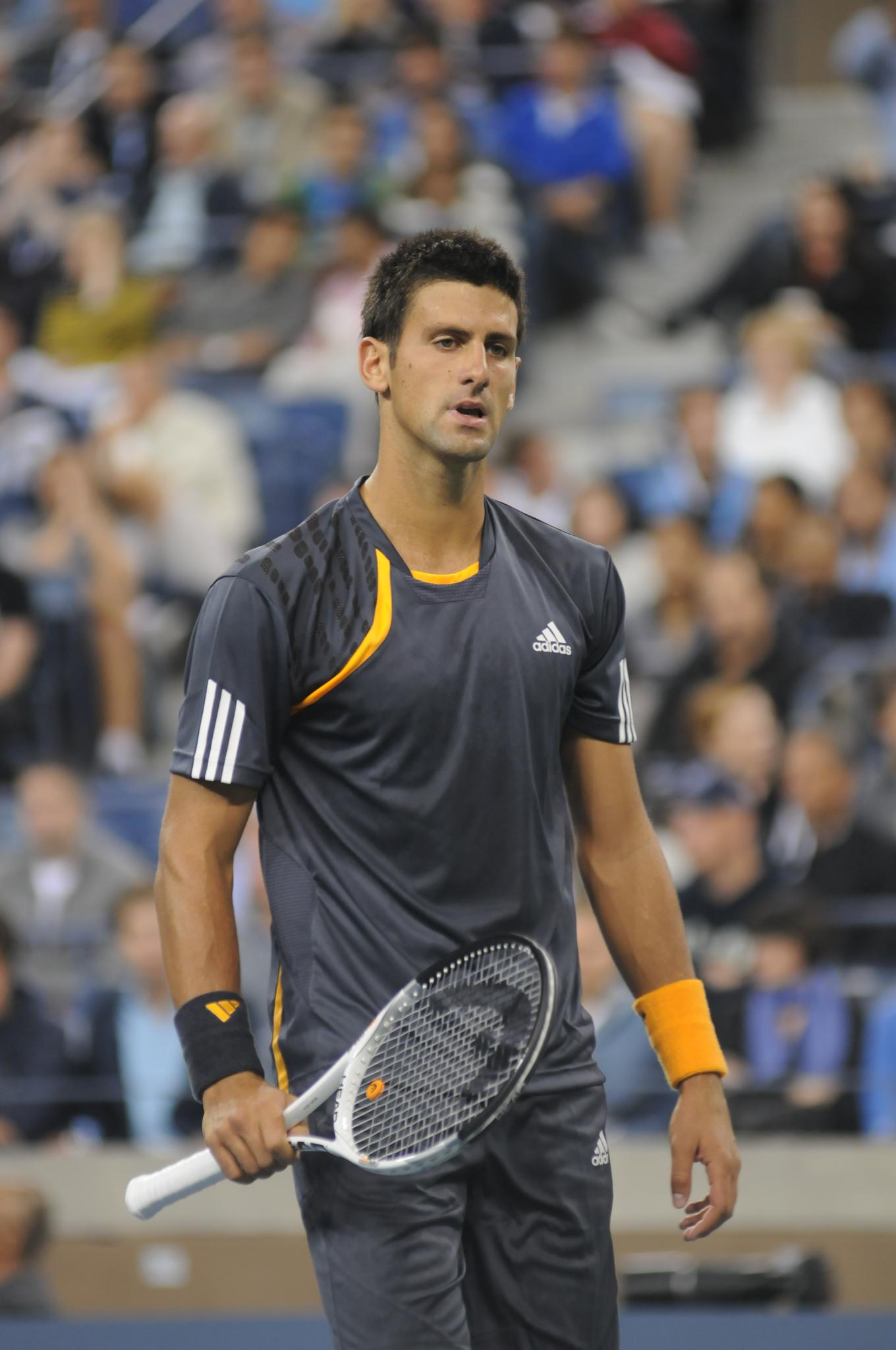 Novak Đoković at the 2009 US Open